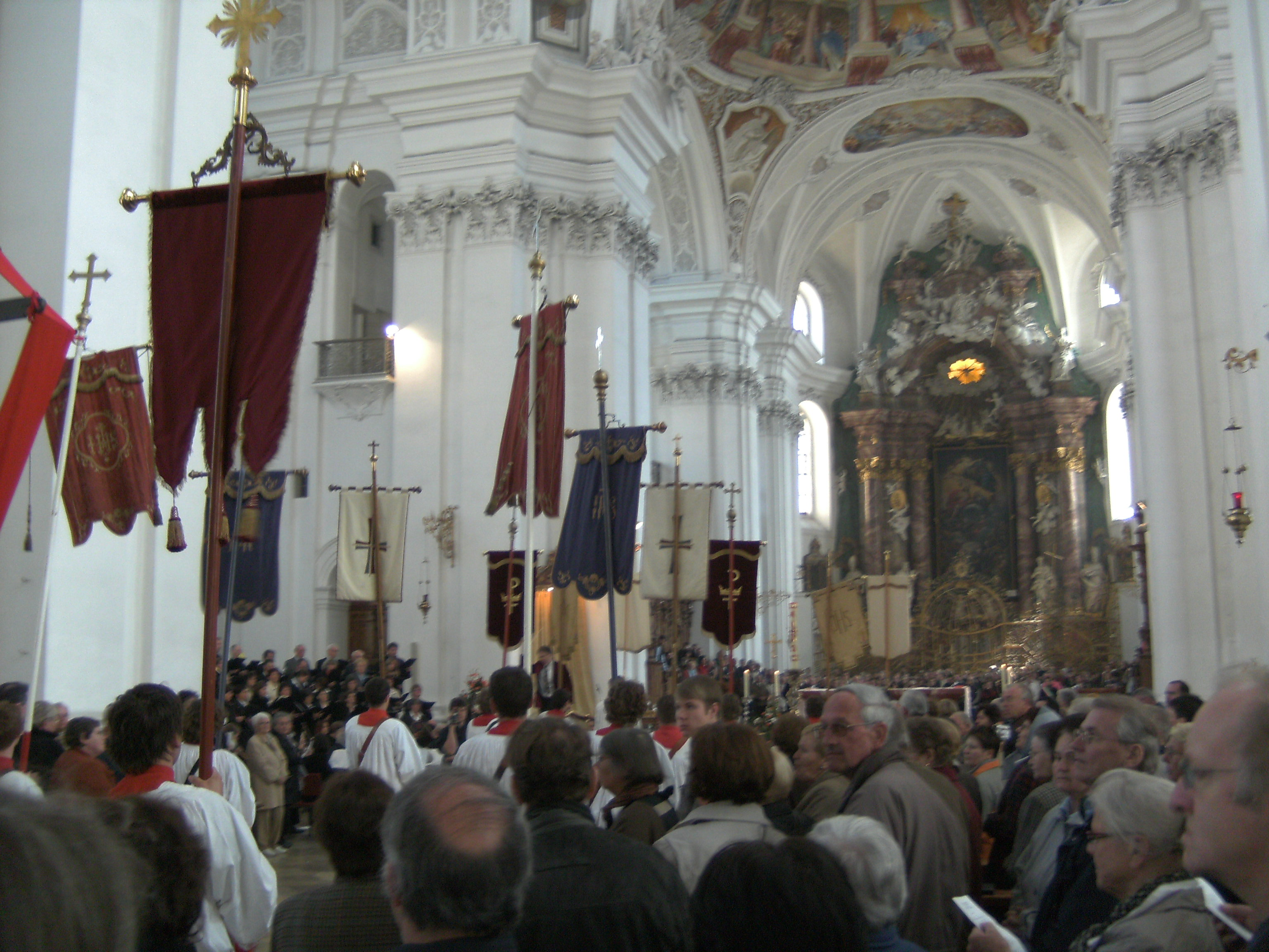 Blutritt Weingarten 2008, Einzug Basilika